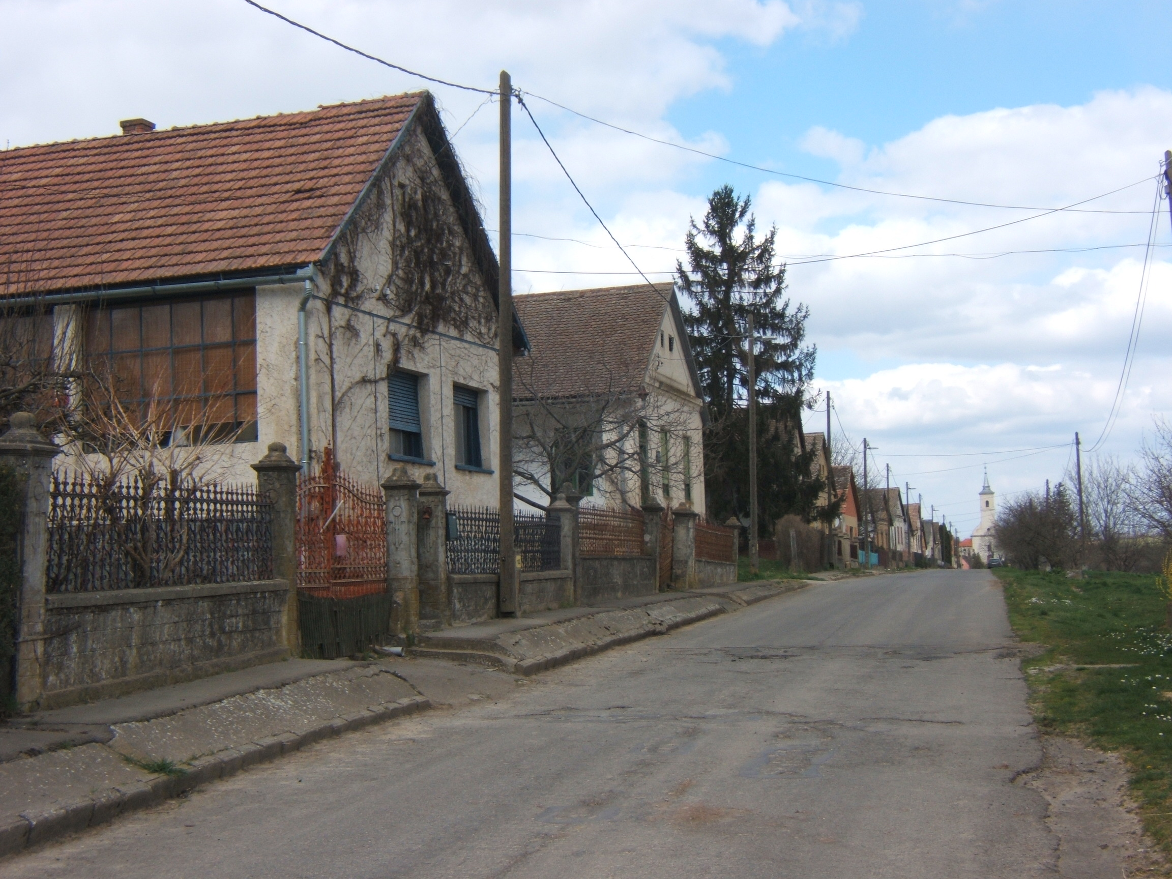 Szárászi utcakép